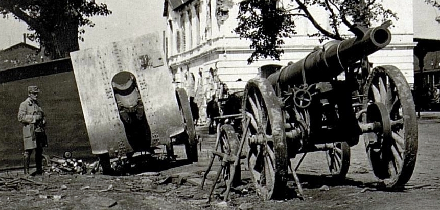 Erbeutetes russisches Grossgeschütz am Bahnhof Zborow nach dem Durchbruch